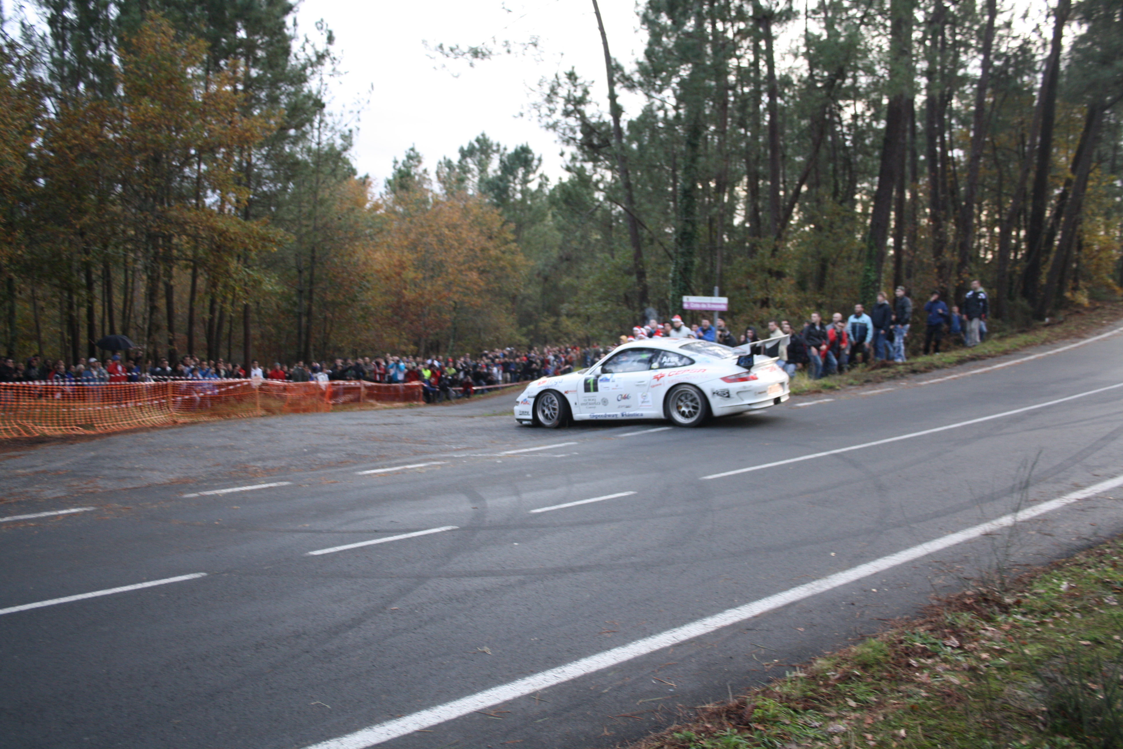 Ivan Ares. Rally Botafumeiro 2011.